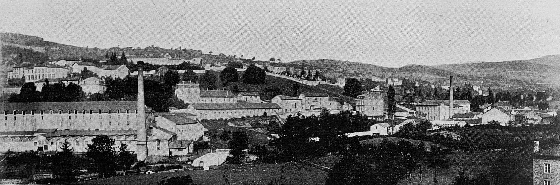 Dictionnaire illustré des communes du département du Rhône. Tome 1 / par MM. E. de Rolland et D. Clouzet.